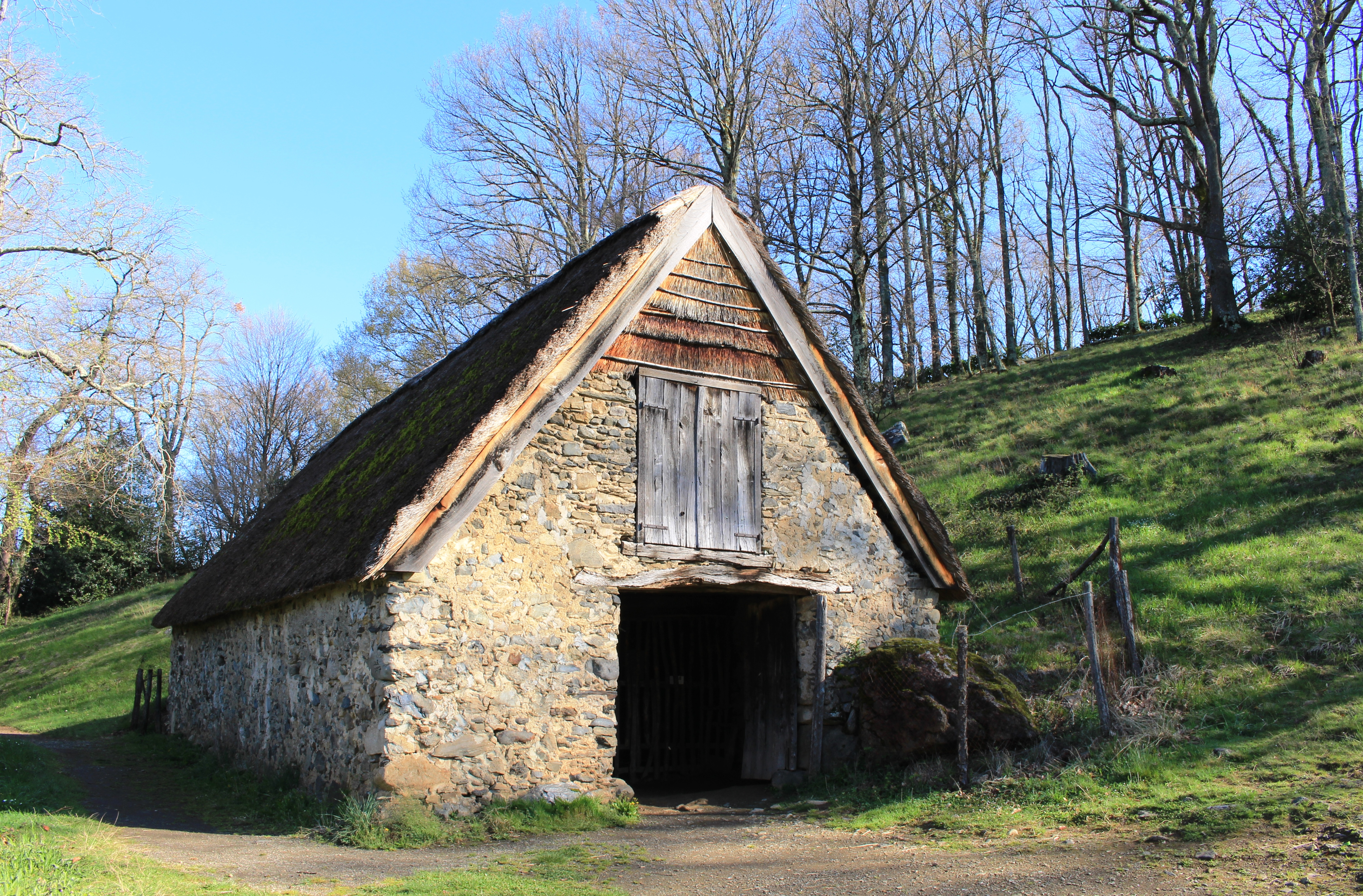 Bergerie de Bernadette Soubirous de Bartrès (Hautes-Pyrénées)